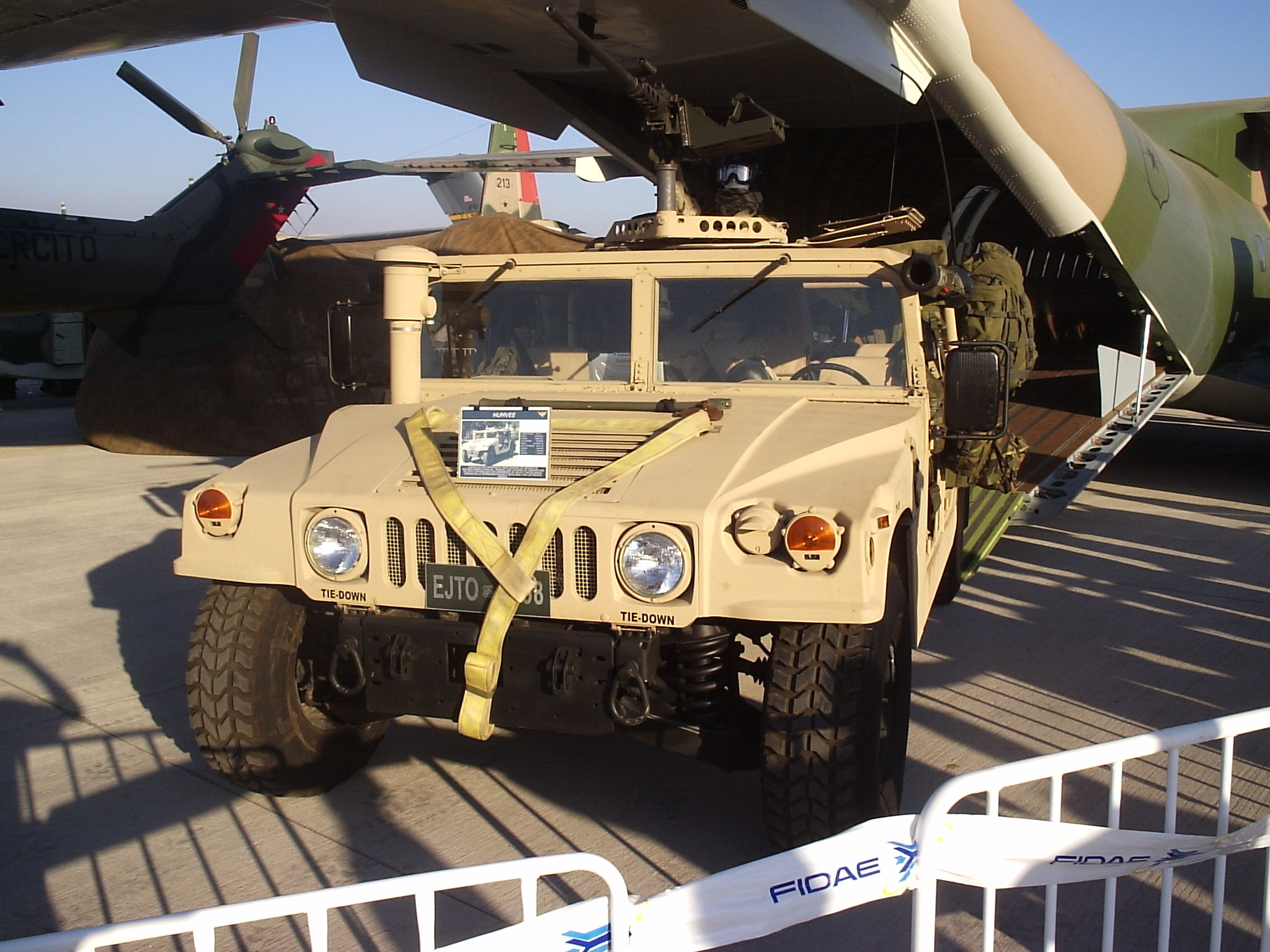 Humvee del Ejército de Chile en fidae 2008